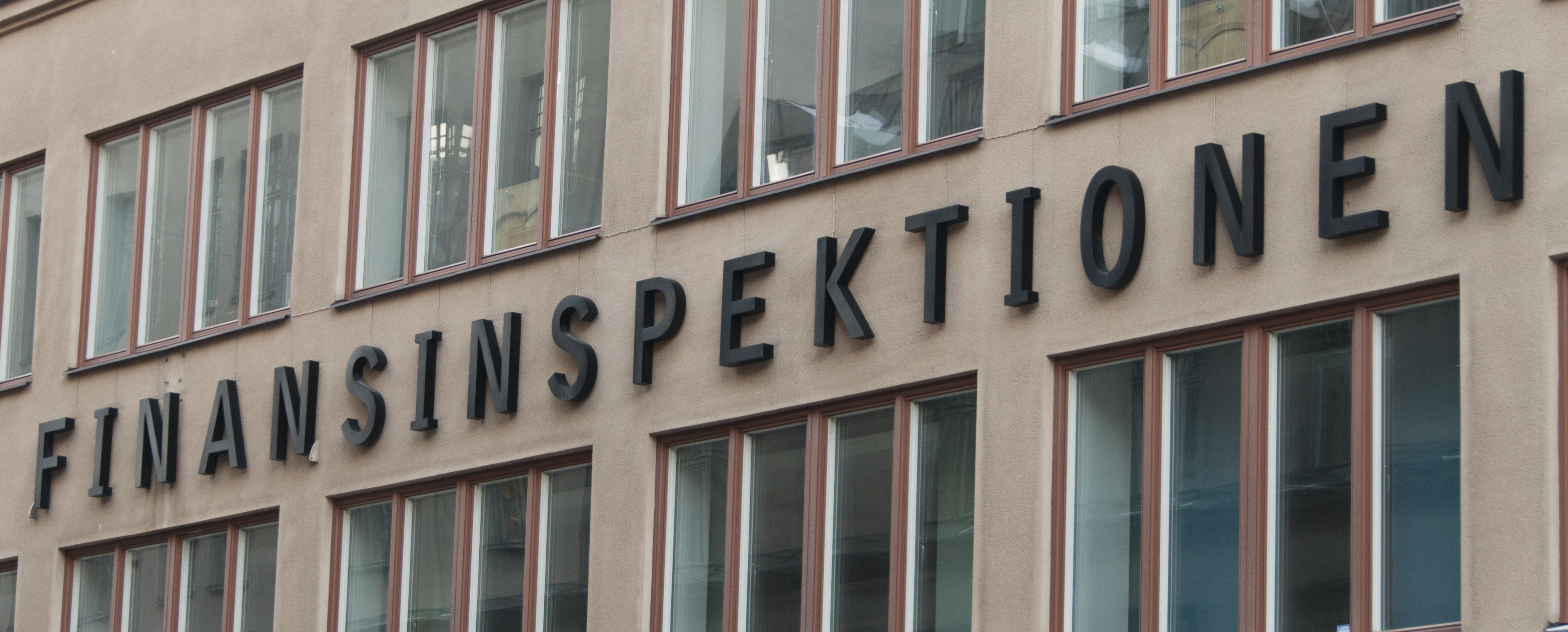 Finansinsektionen på Norrlandsgatan